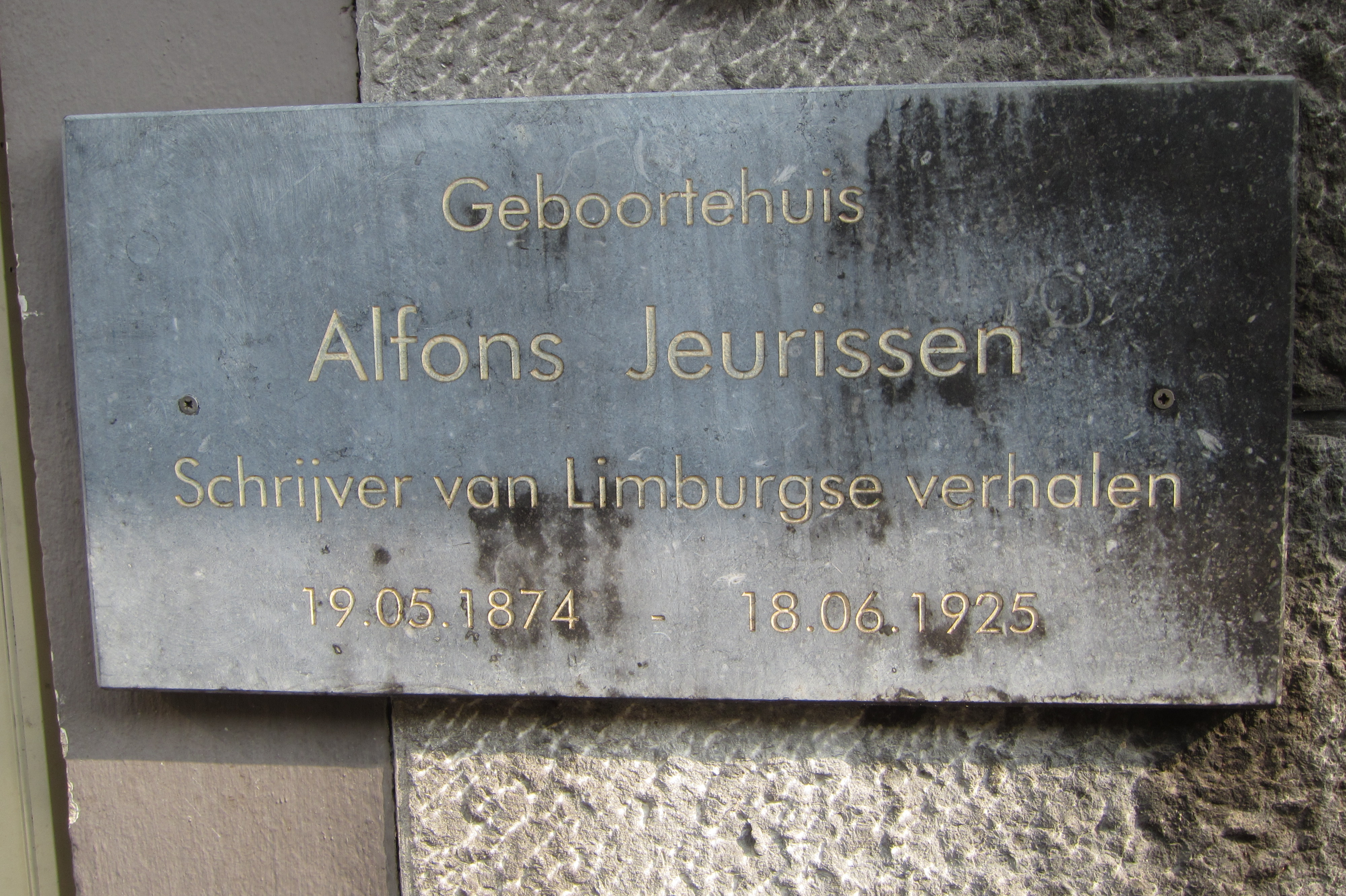 Plakkaat aan geboortehuis Alfond Jeurissen, Fruitmarkt 22, Hasselt, België